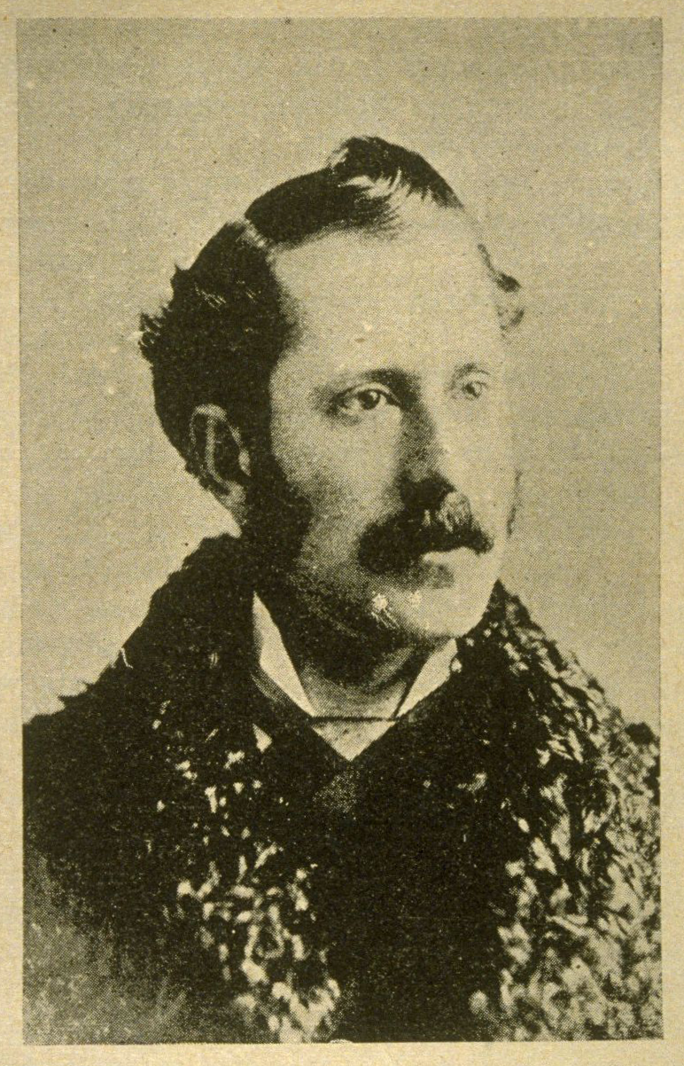 Poète et homme de lettres québécois